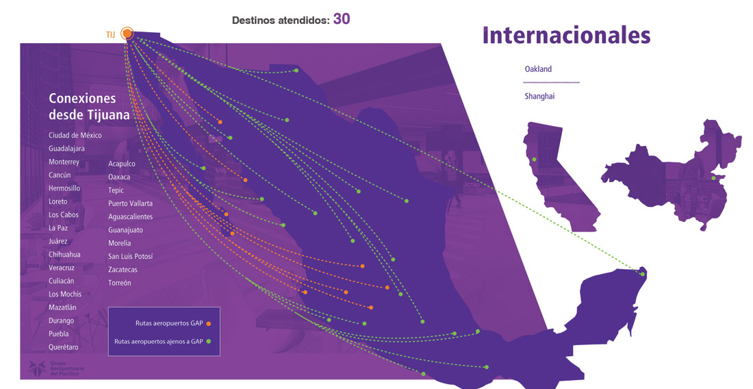 Destinos de Tijuana